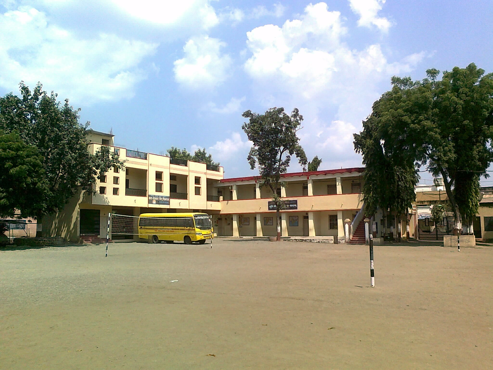 Baal Sanskar Kendra and Jr College in Nutan Madhyamik Vidyalaya, Chinawal village, India